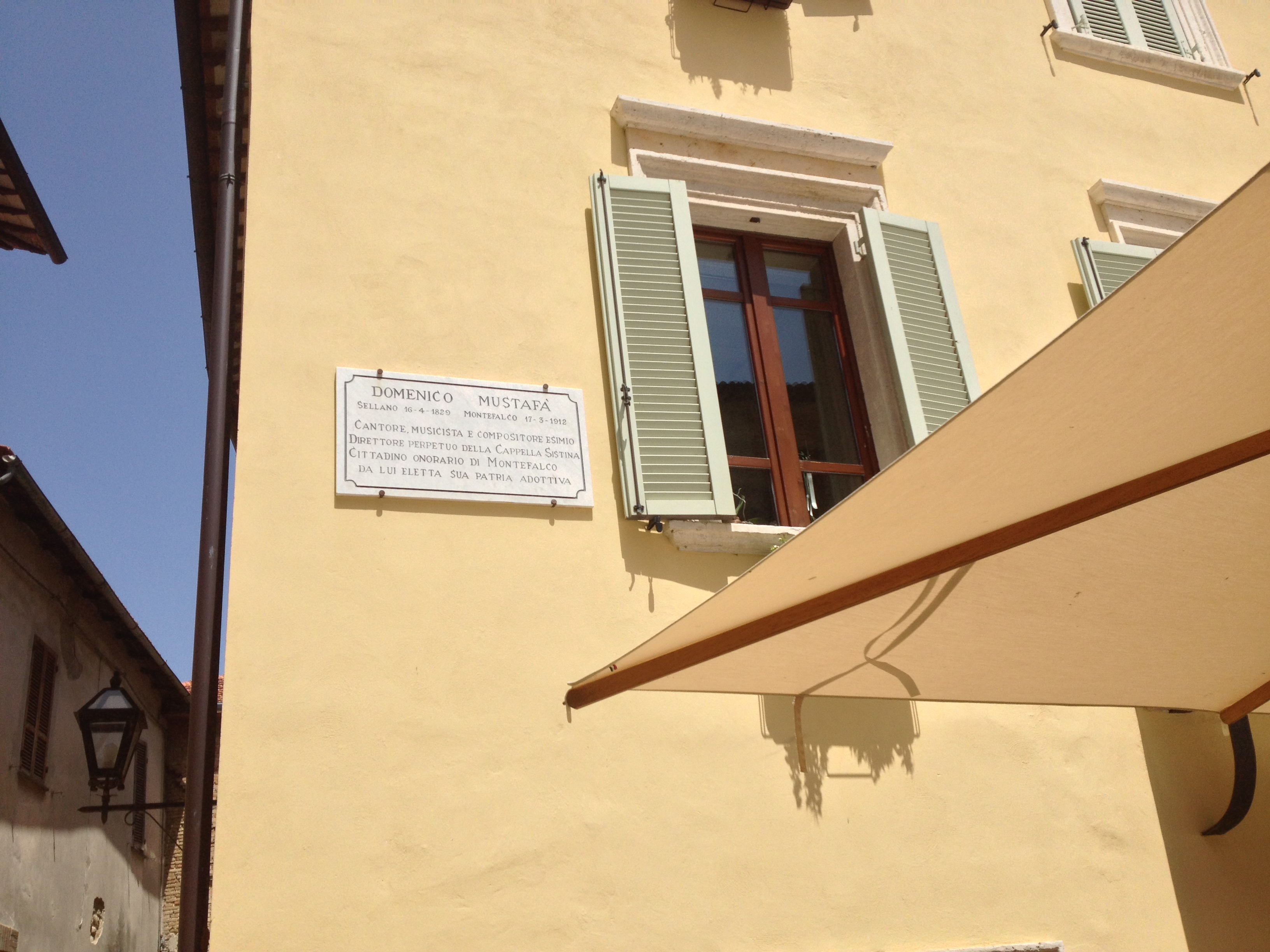 Targa commemorativa del compositore Domenico Mustafà a Montefalco, Italia, cittadina umbra da lui eletta quale seconda Patria e dove morì